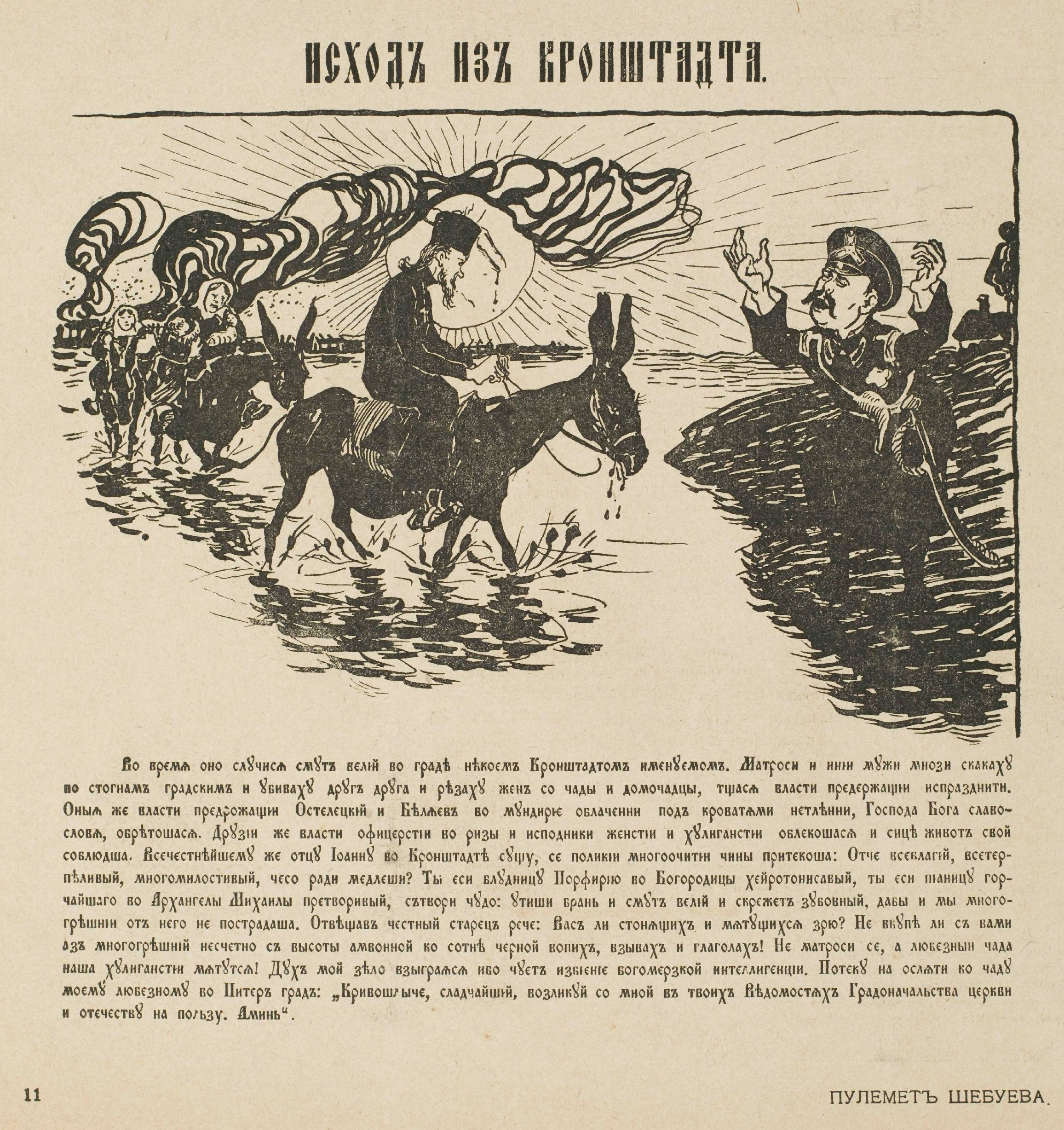 Обложка журнала «Пулемет» с сатирическим изображением о. Иоанна, покидающего Кронштадт во время восстания матросов в 1905 г. Фотография из Славянской коллекции Нью-Йоркской публичной библиотеки. Книга: Надежда Киценко. Святой нашего времени: отец Иоанн Кронштадтский и русский народ. М., 2006, стр. 216.